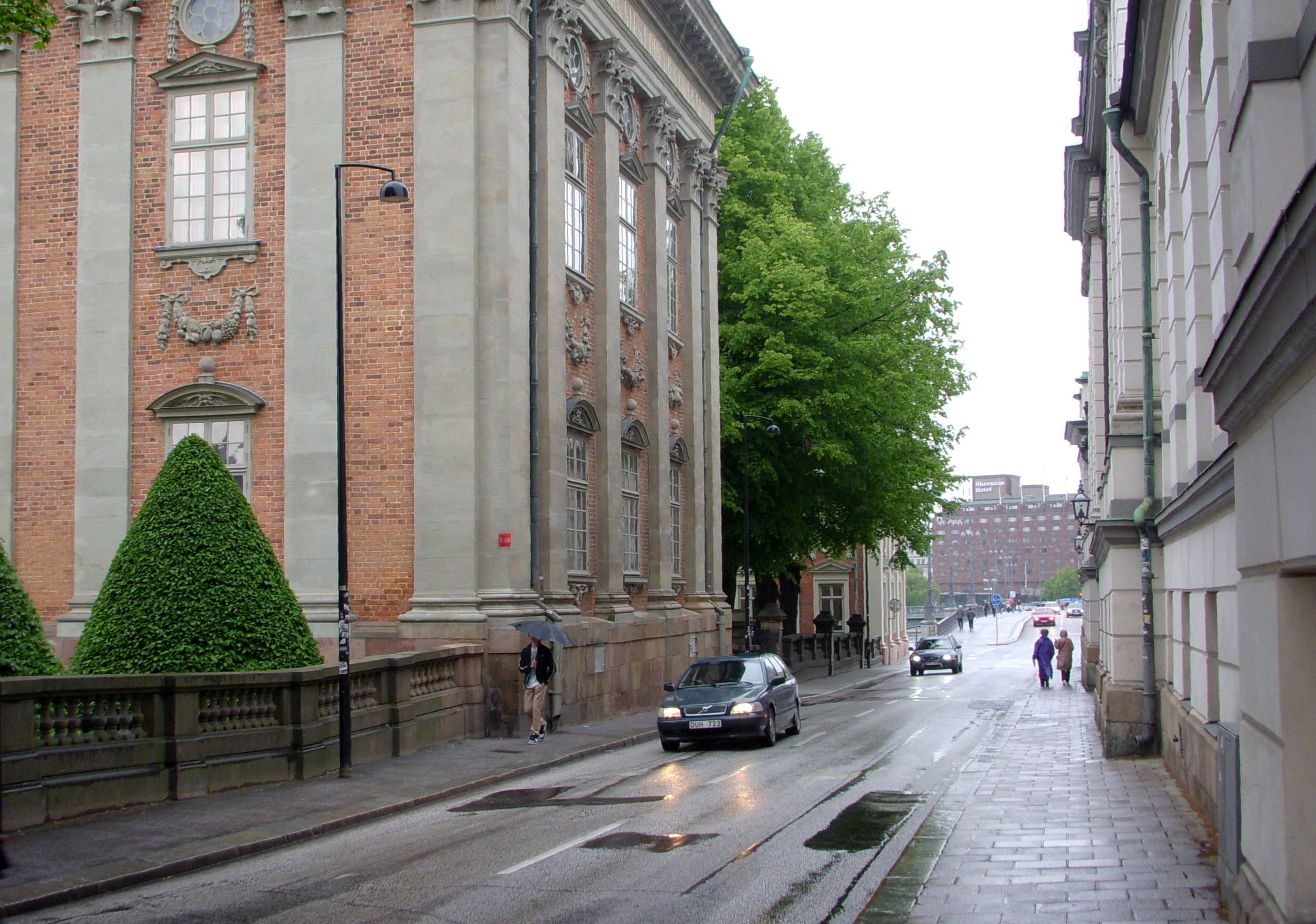 Riddarhusgränd i Gamla stan, Stockholm, vy mot norr